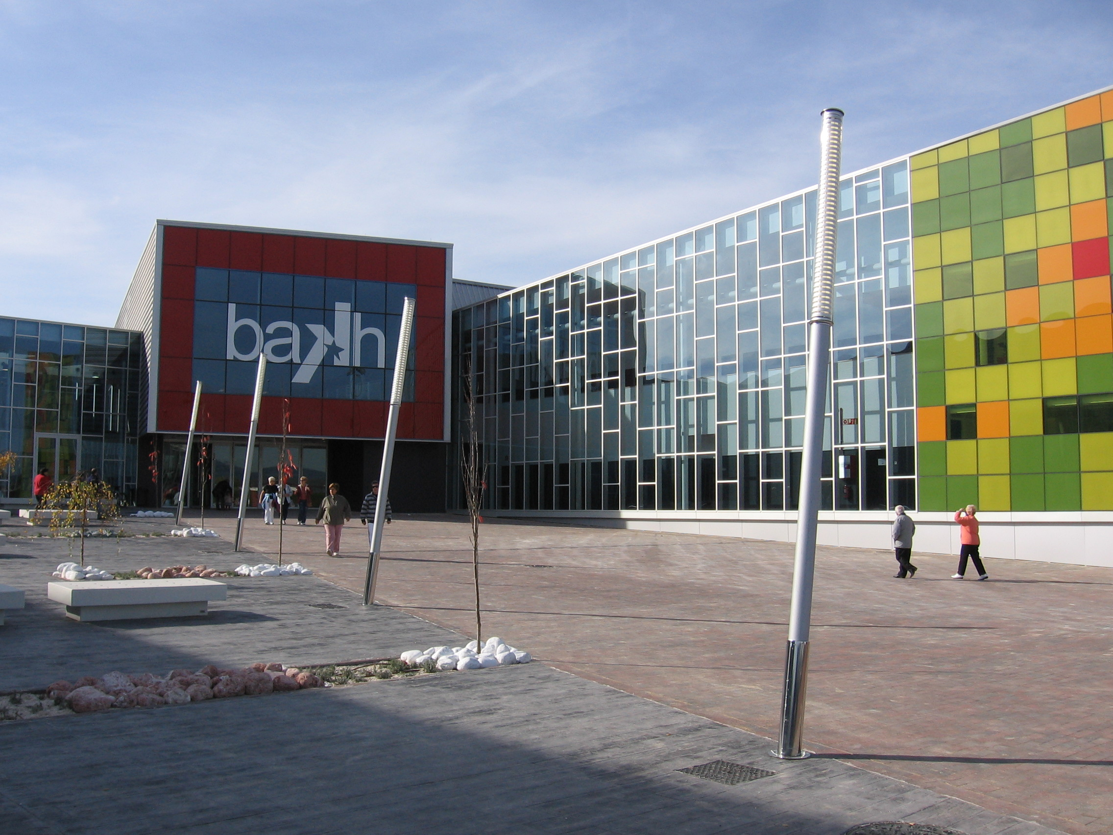 Centro deportivo del Baskonia, Vitoria-Gasteiz, Álava, País Vasco, España